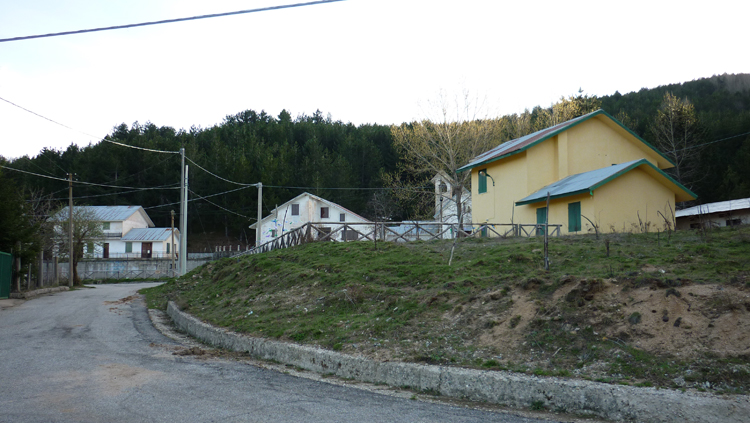 Villaggio cagno. Il centro del villaggio. Licensing Categoria:San Giovanni in Fiore